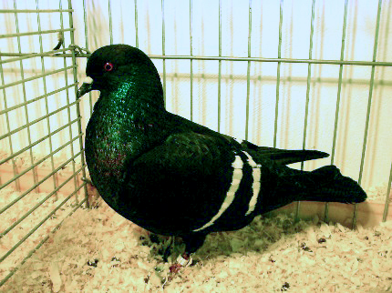 Feldfarbentaube schwarz